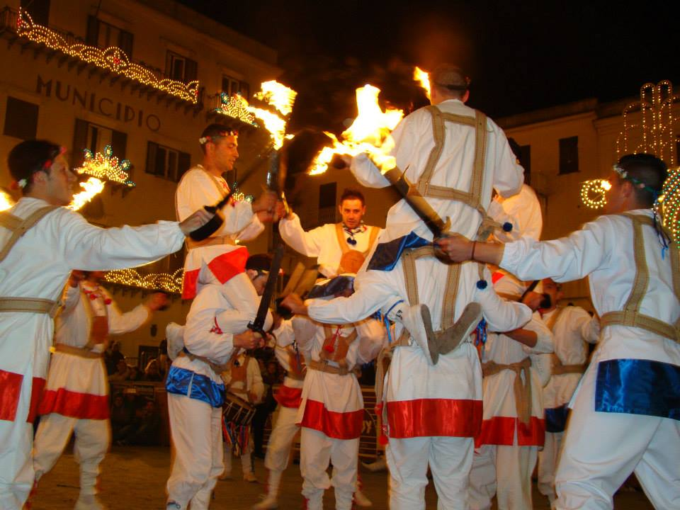 Gruppo folkloristico del tataratà